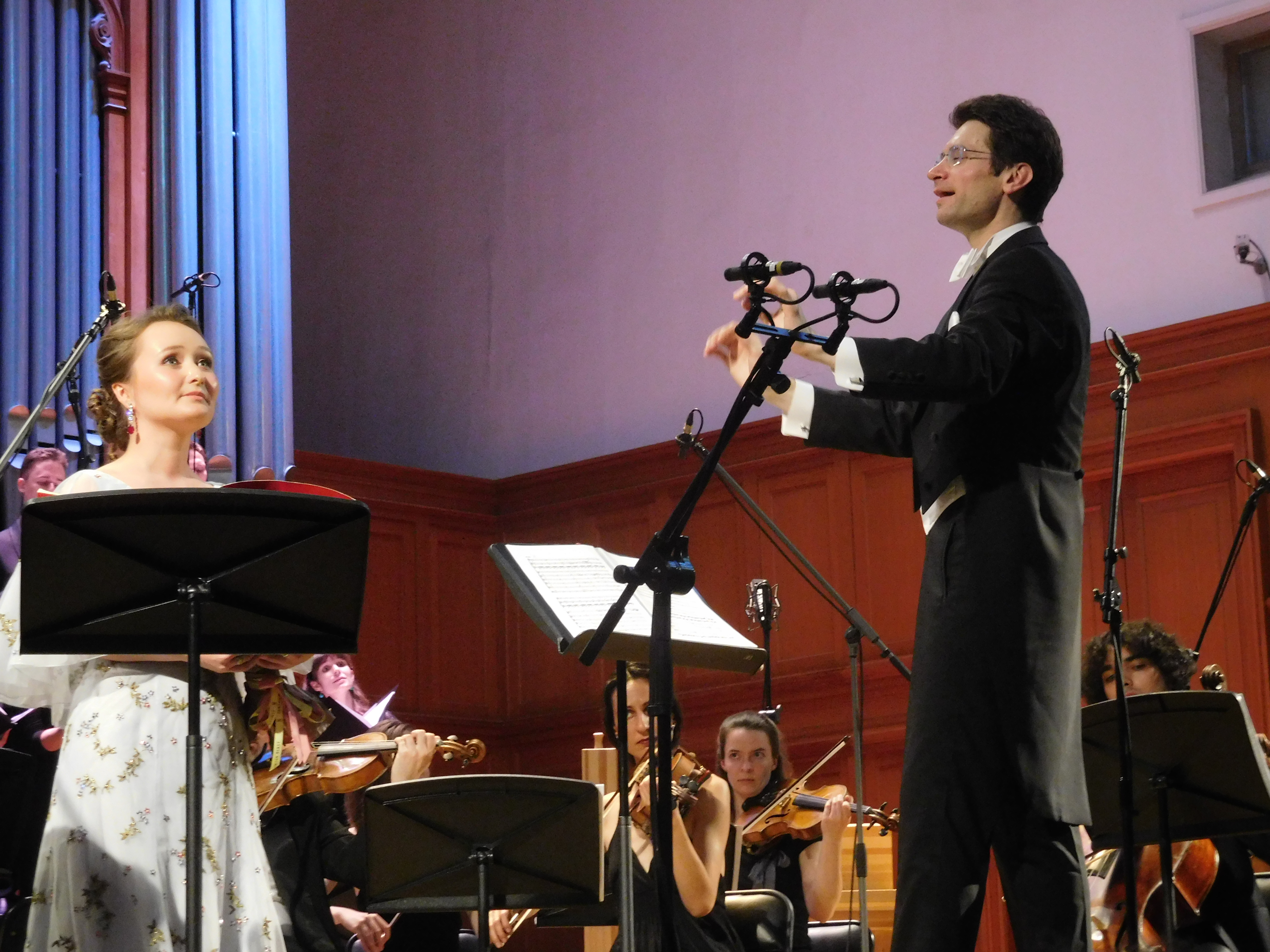 Дирижёр Михаил Антоненко и певица Юлия Лежнева на концерте Моцарт-гала в БЗК. Москва, 30 мая 2018